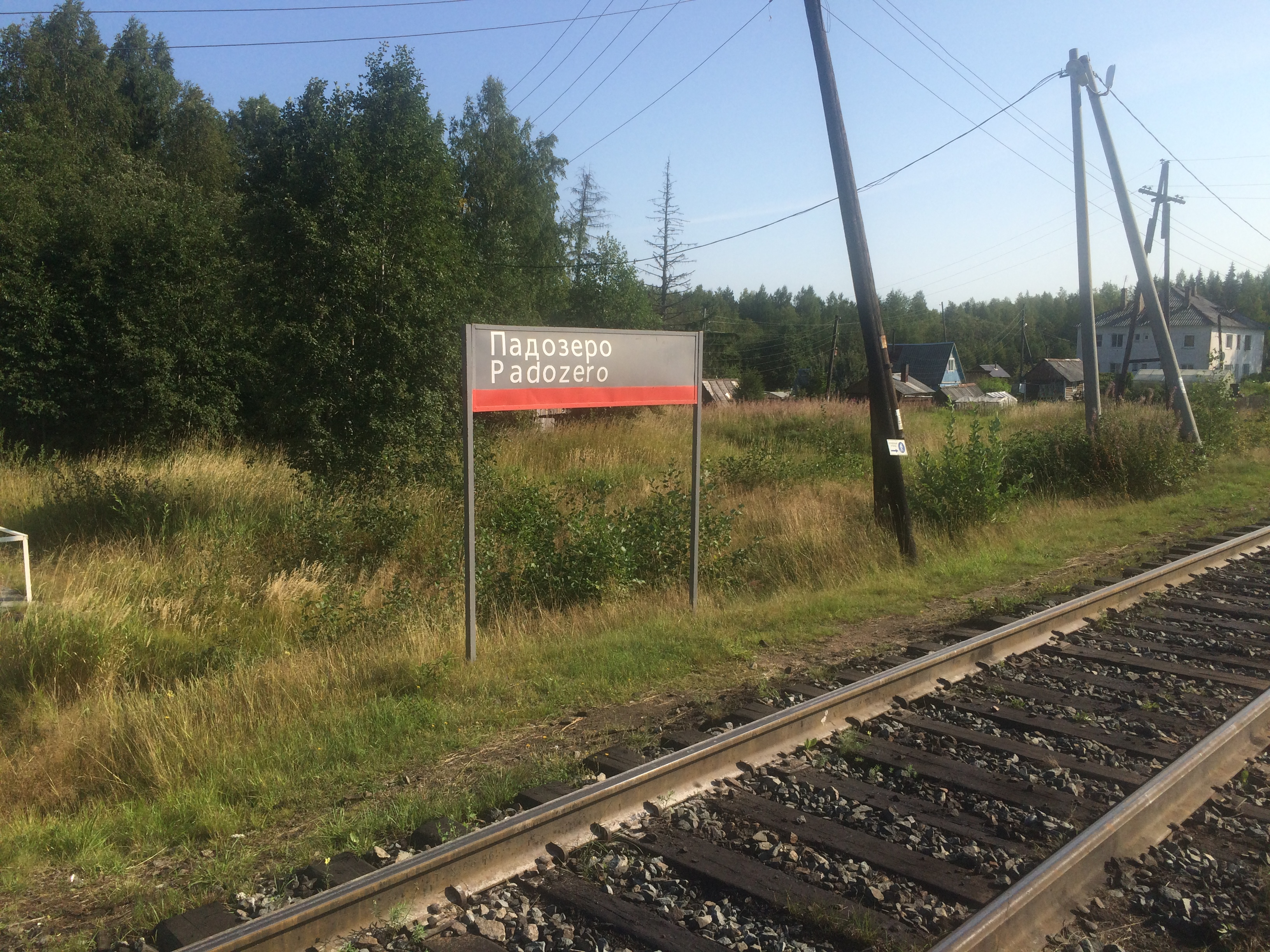 ст. Падозеро